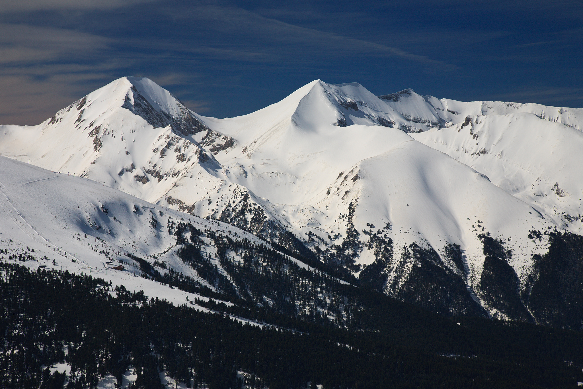 Пирин, връх Вихрен в Пирин планина